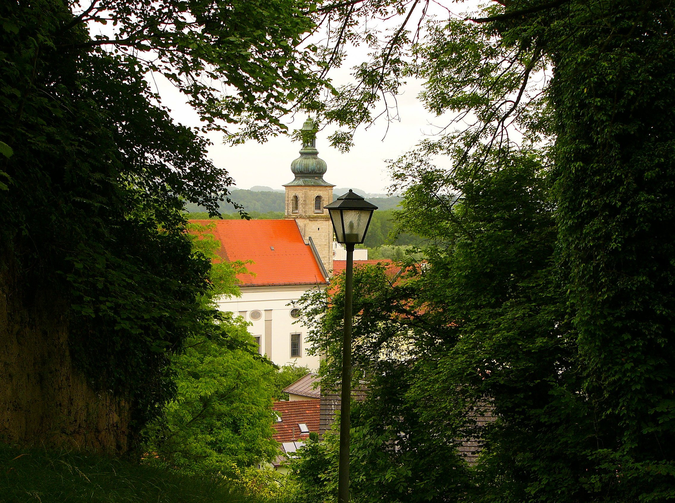 Allerheiligenkirche, ehemalige Klosterkirche der Augustiner-Eremiten.This is a photograph of an architectural monument.